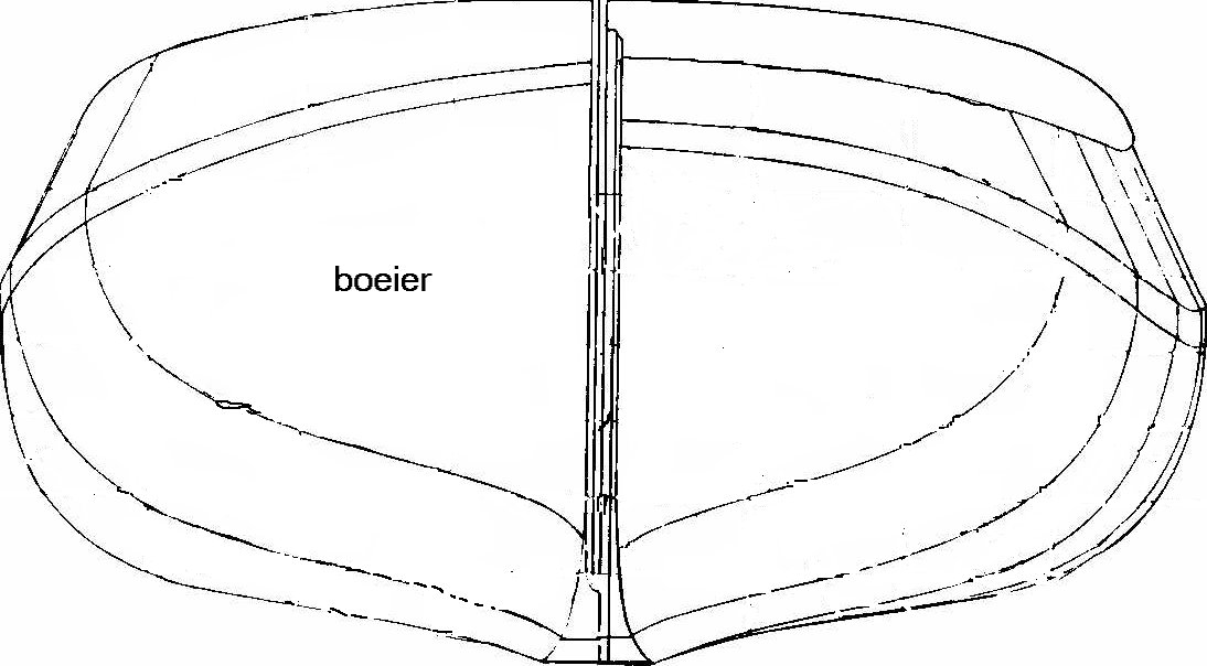 eigen tek.